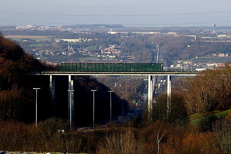 De Viaduc vu Cheratte vu Südoste gesinn.